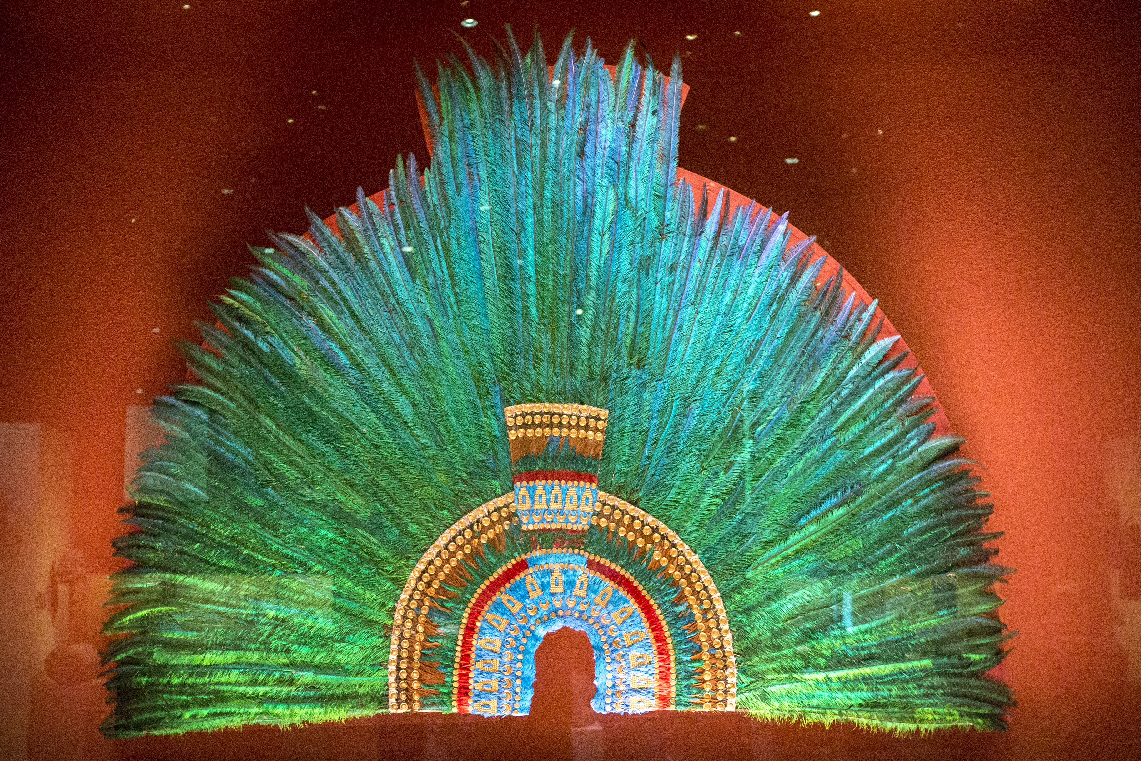 Feather headdress Moctezuma II; Museo Nacional de Antropología e Historia, México (modern reproduction)